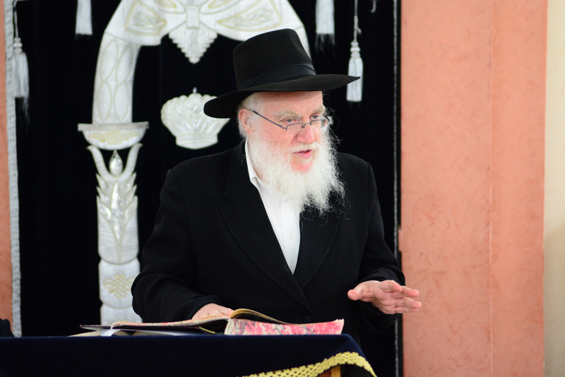 הרב משה הלין בכינוס תורה